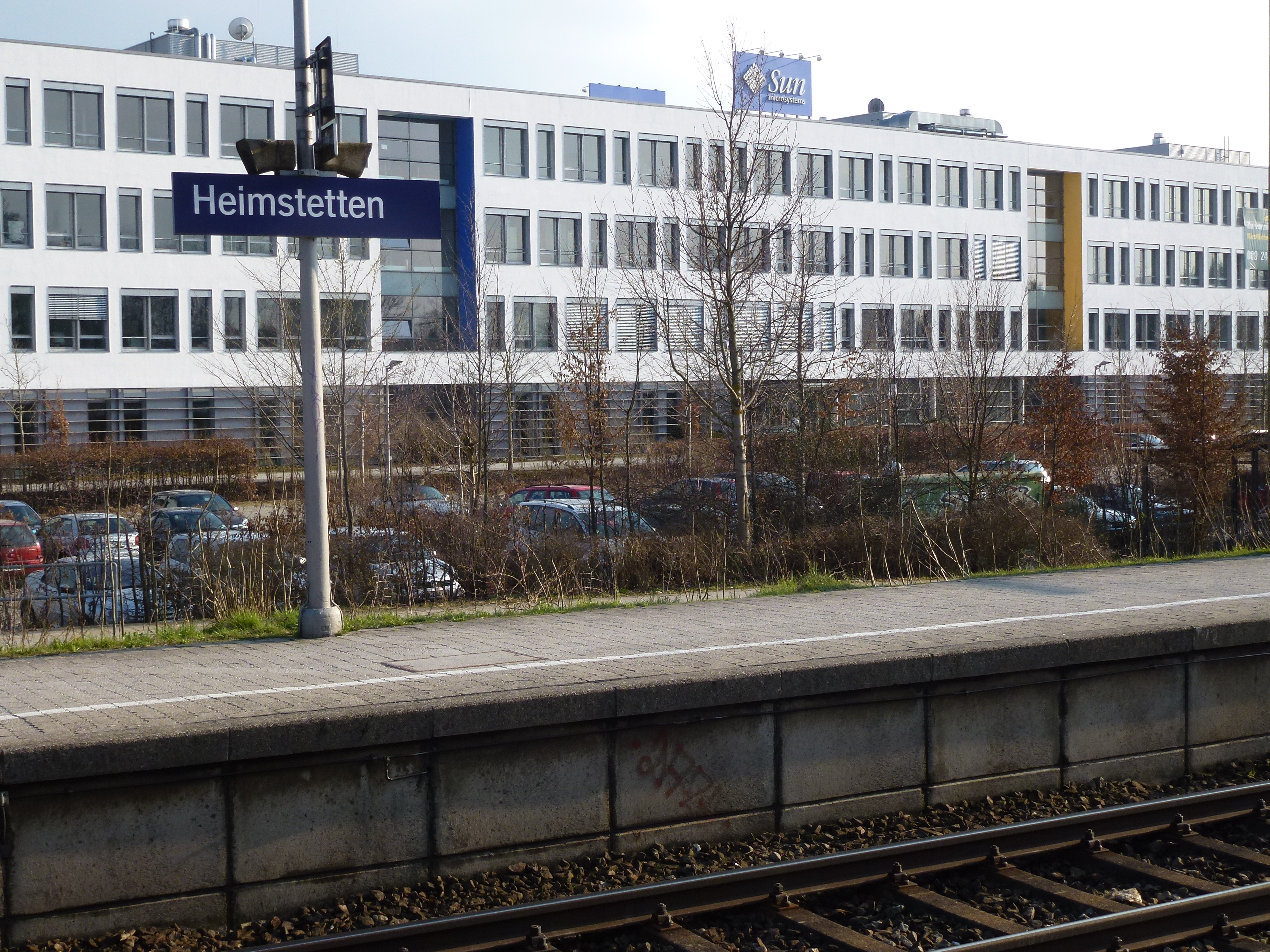 Train stop - Heimstetten